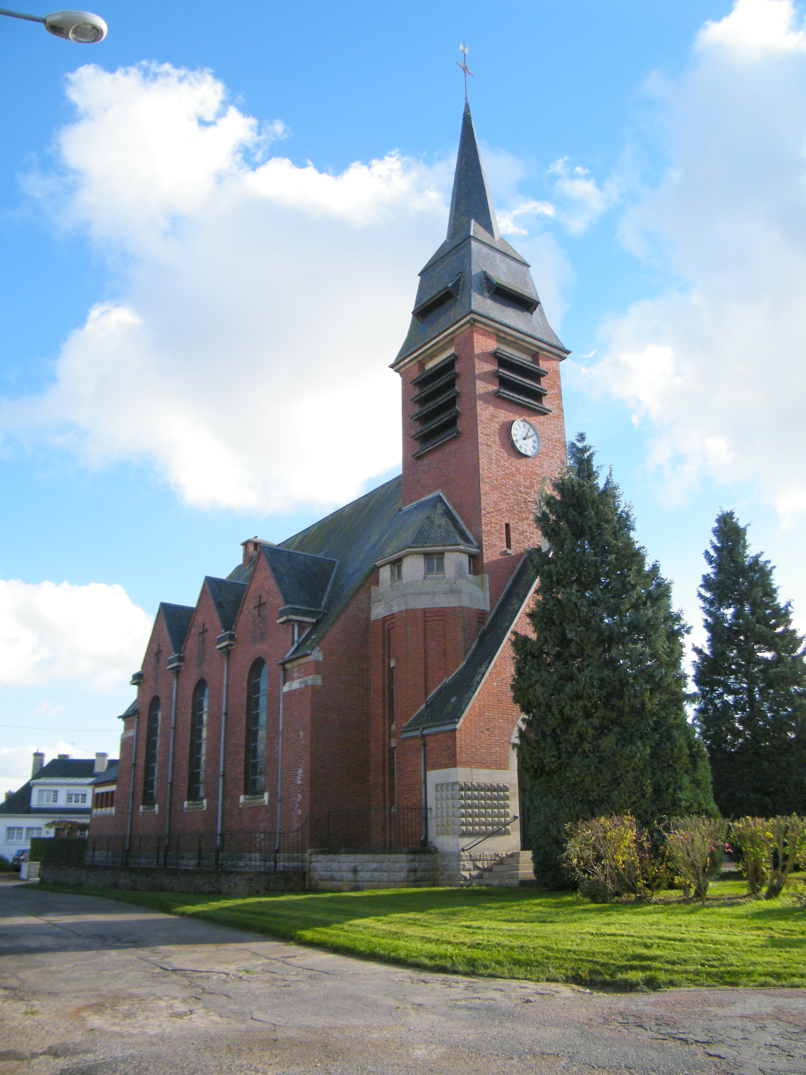 L'église.